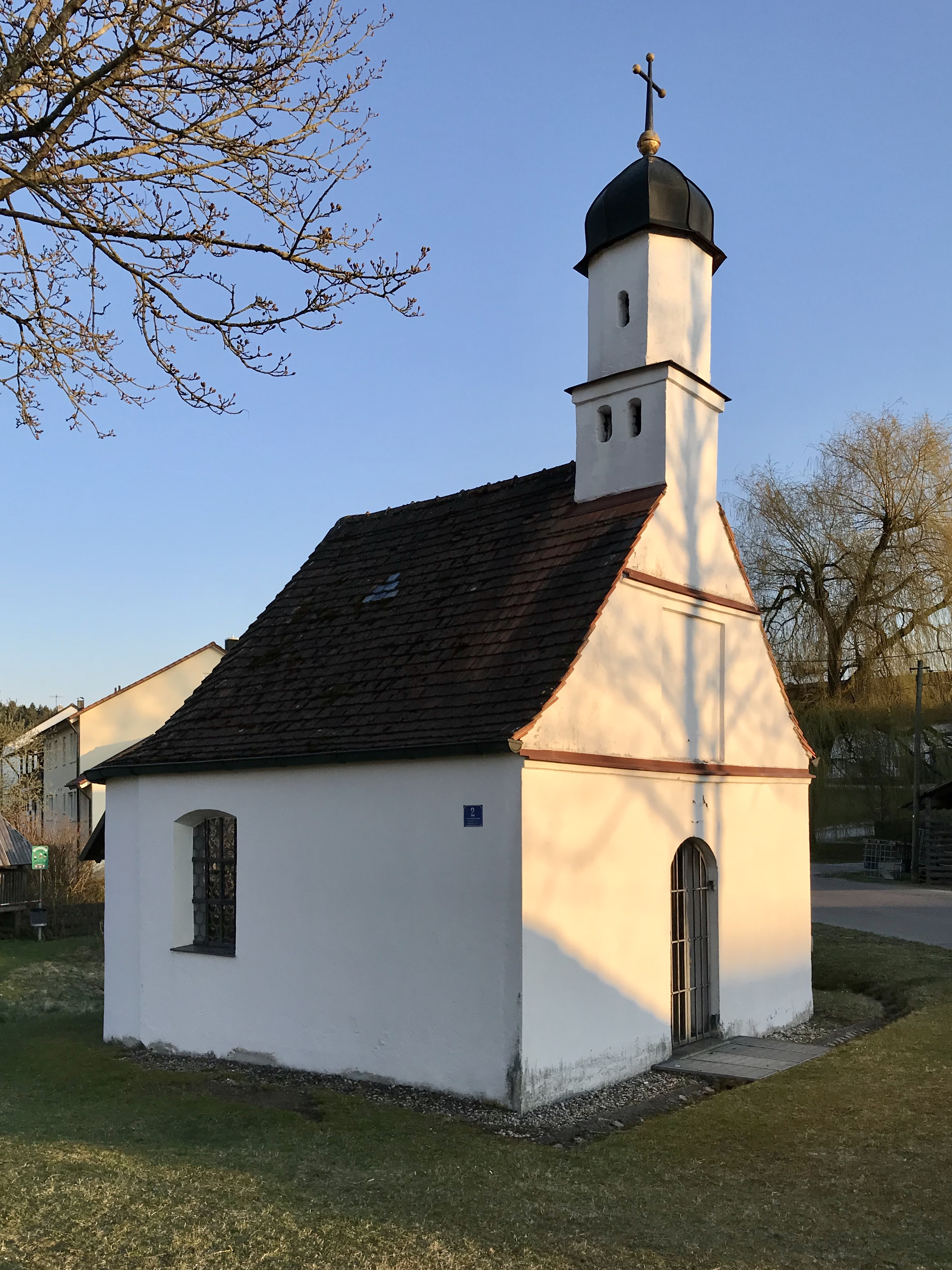 Schlichter Satteldachbau mit profilierten Giebelgesimsen und Dachreiter, 18. Jahrhundert